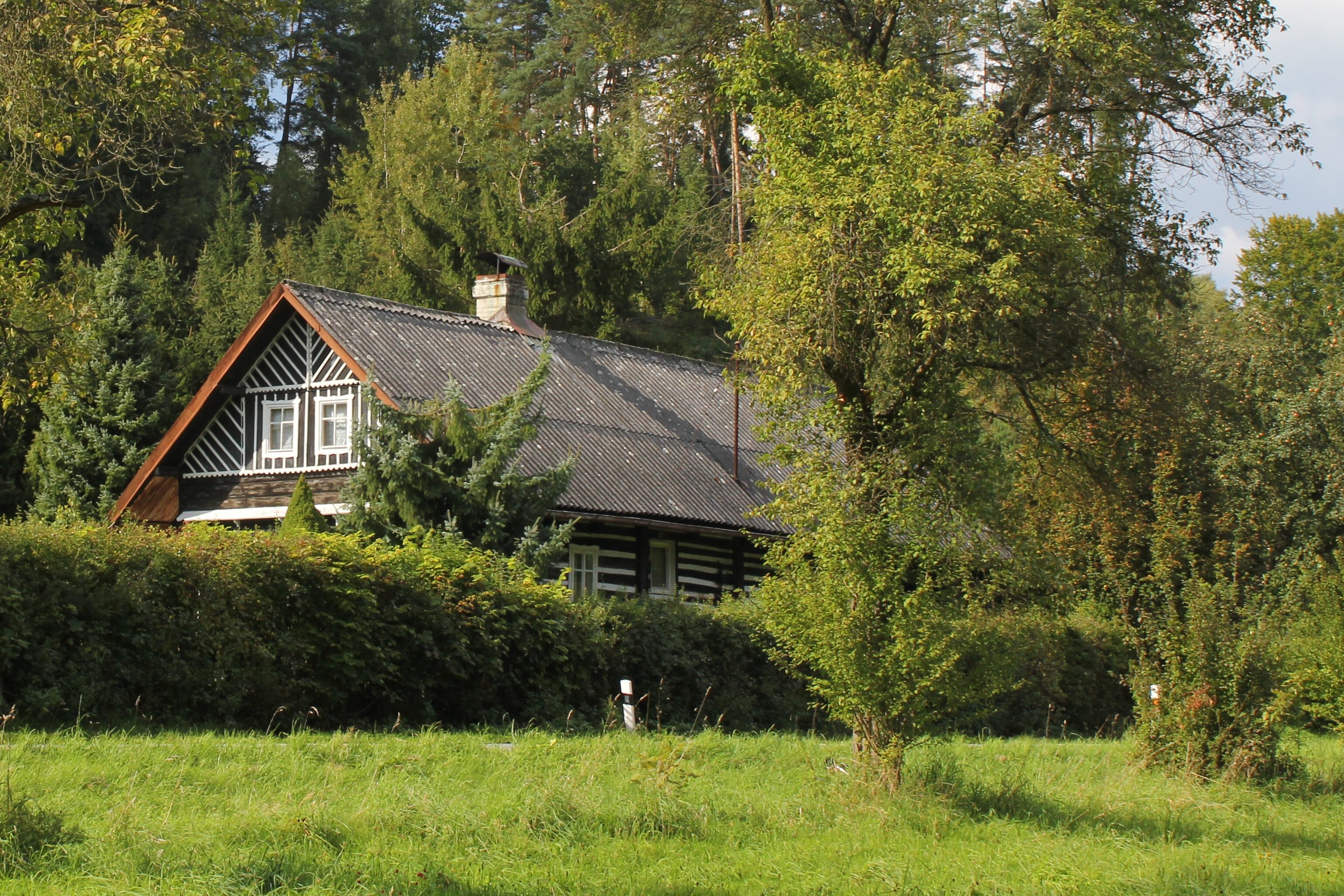 Dům při hlavní silnici směrem na Bohumileč